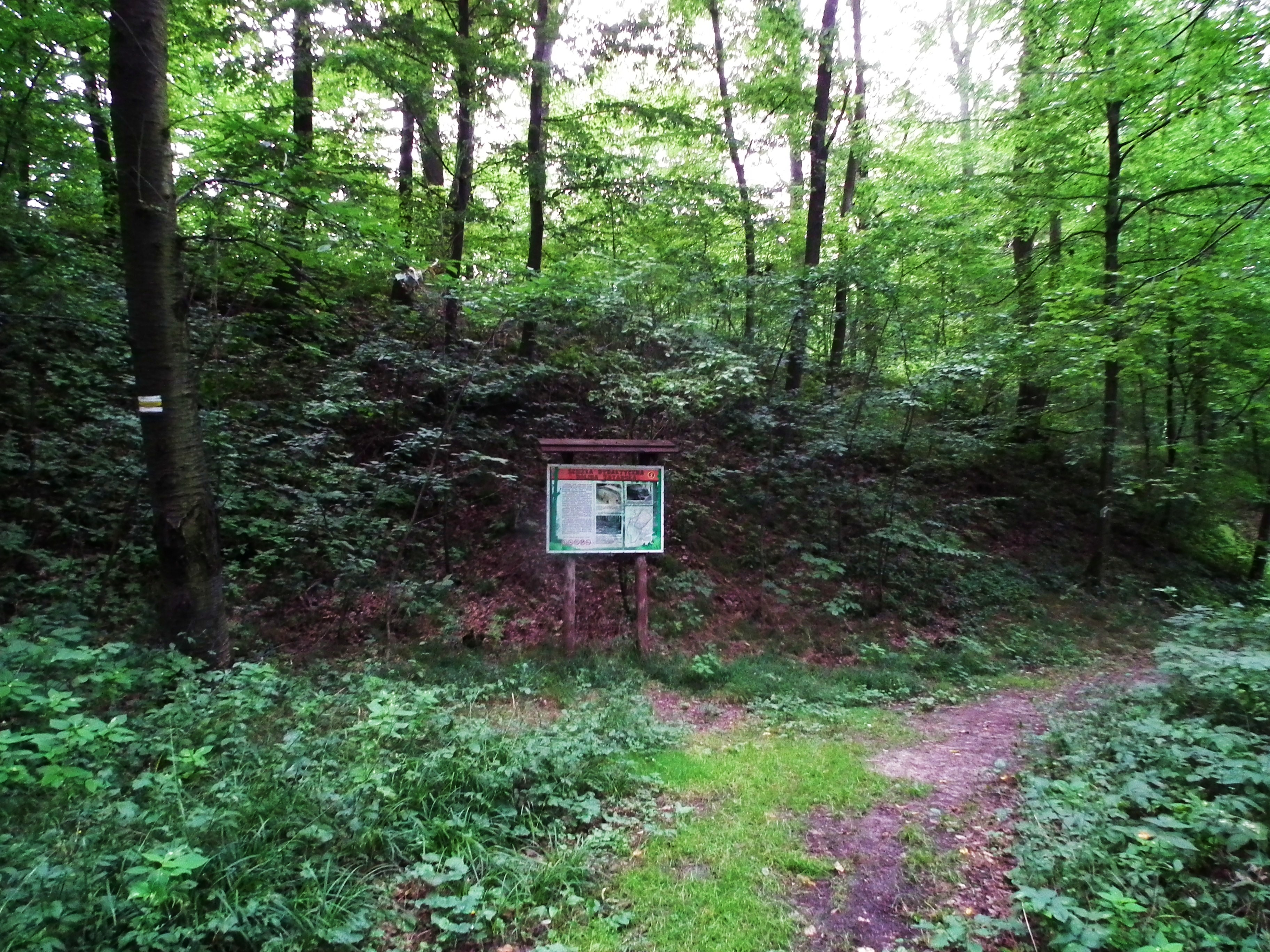 Dolina Tatarska pod Gilowem.